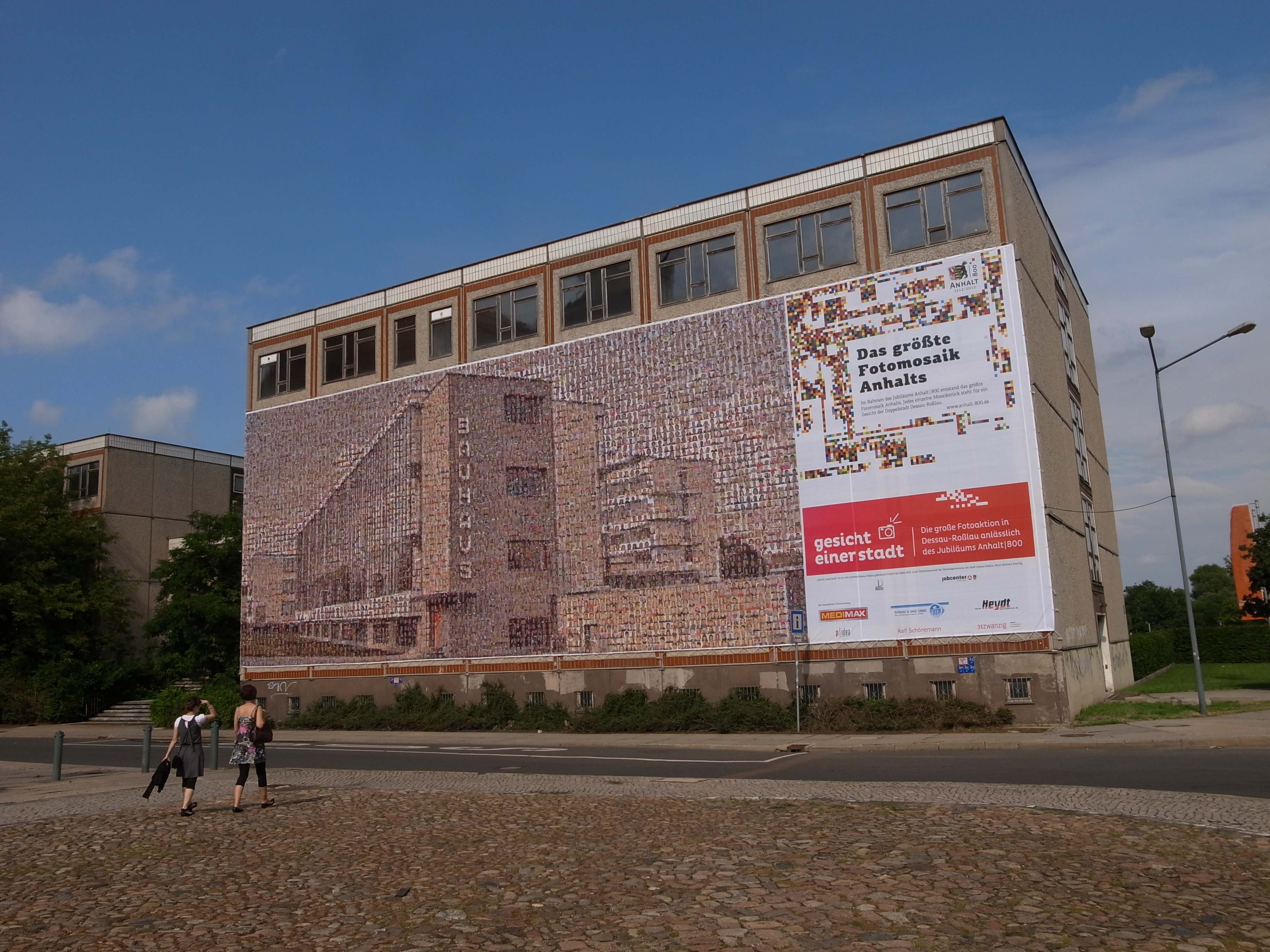 Dessau,Fotomosaik zusammengefügt aus ca. 6000 Gesichtern auf einer 28m x 10m großen Leinwand anlässlich des Jubiläums "Anhalt 800"